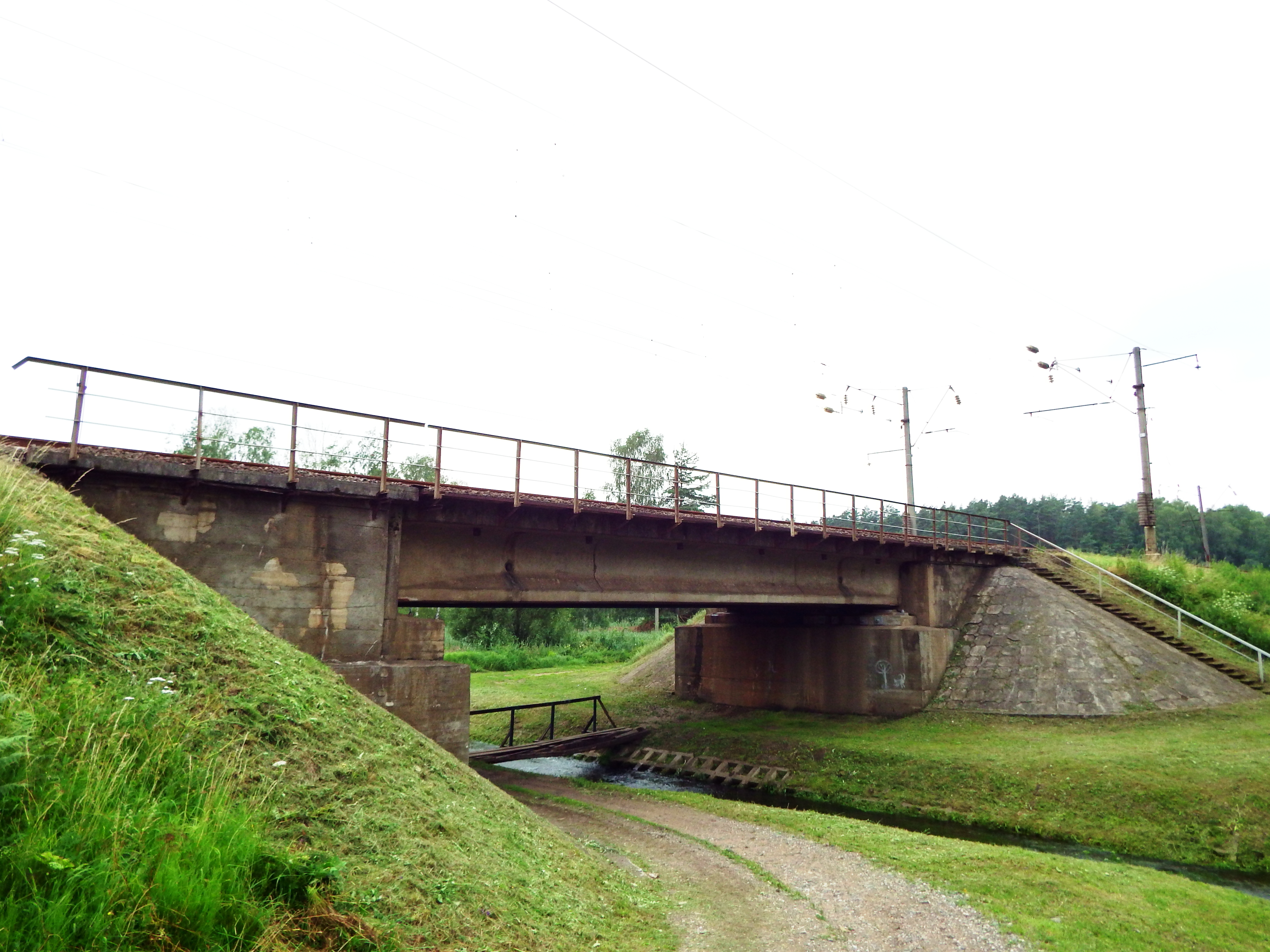 Tiltas per Bražuolę, Elektrėnų sav.